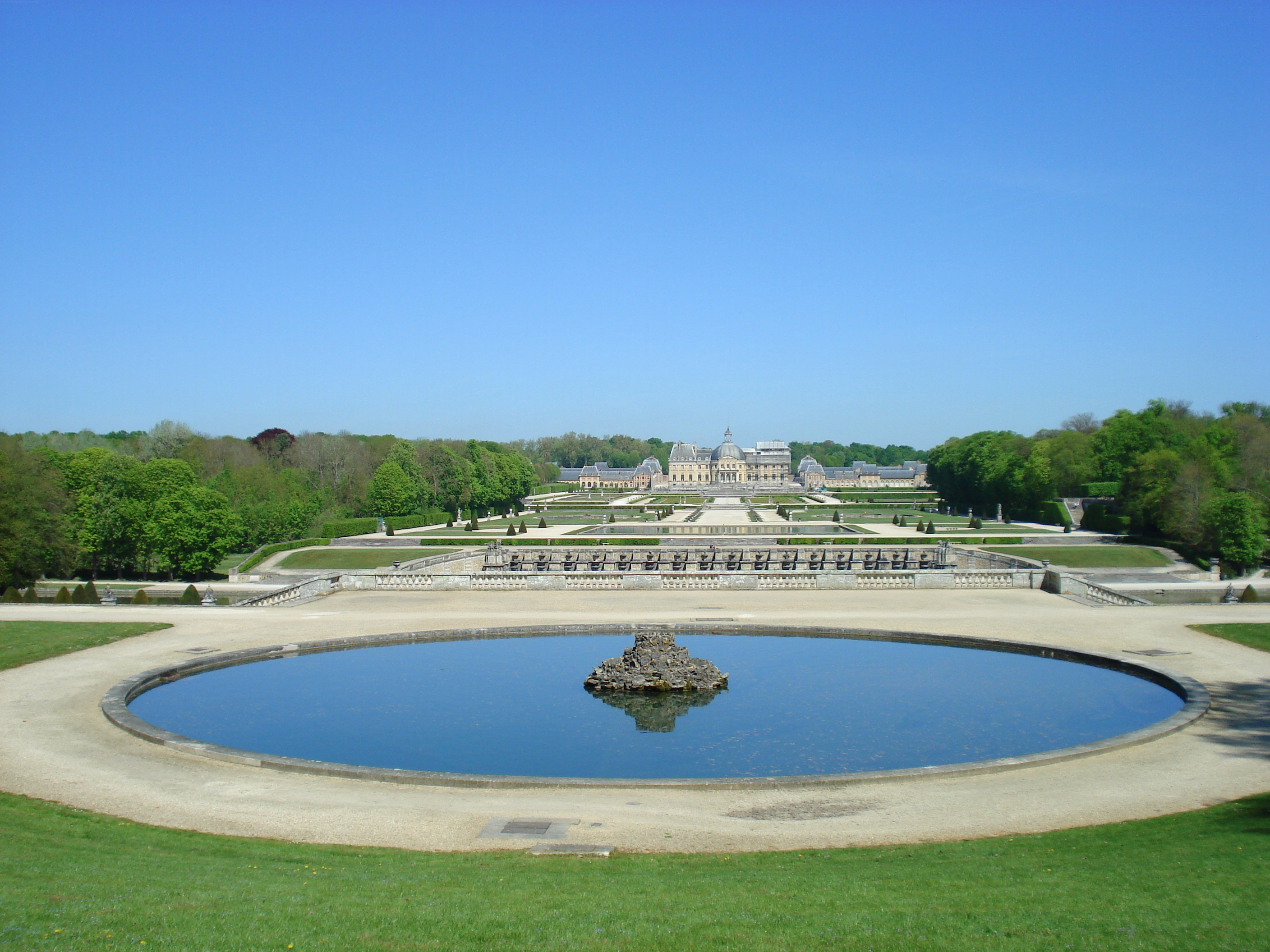 Schloss Vaux-le-Vicomte